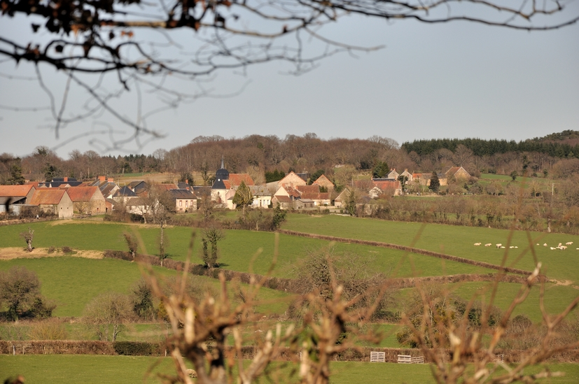 Vijon (Indre) - Vue générale